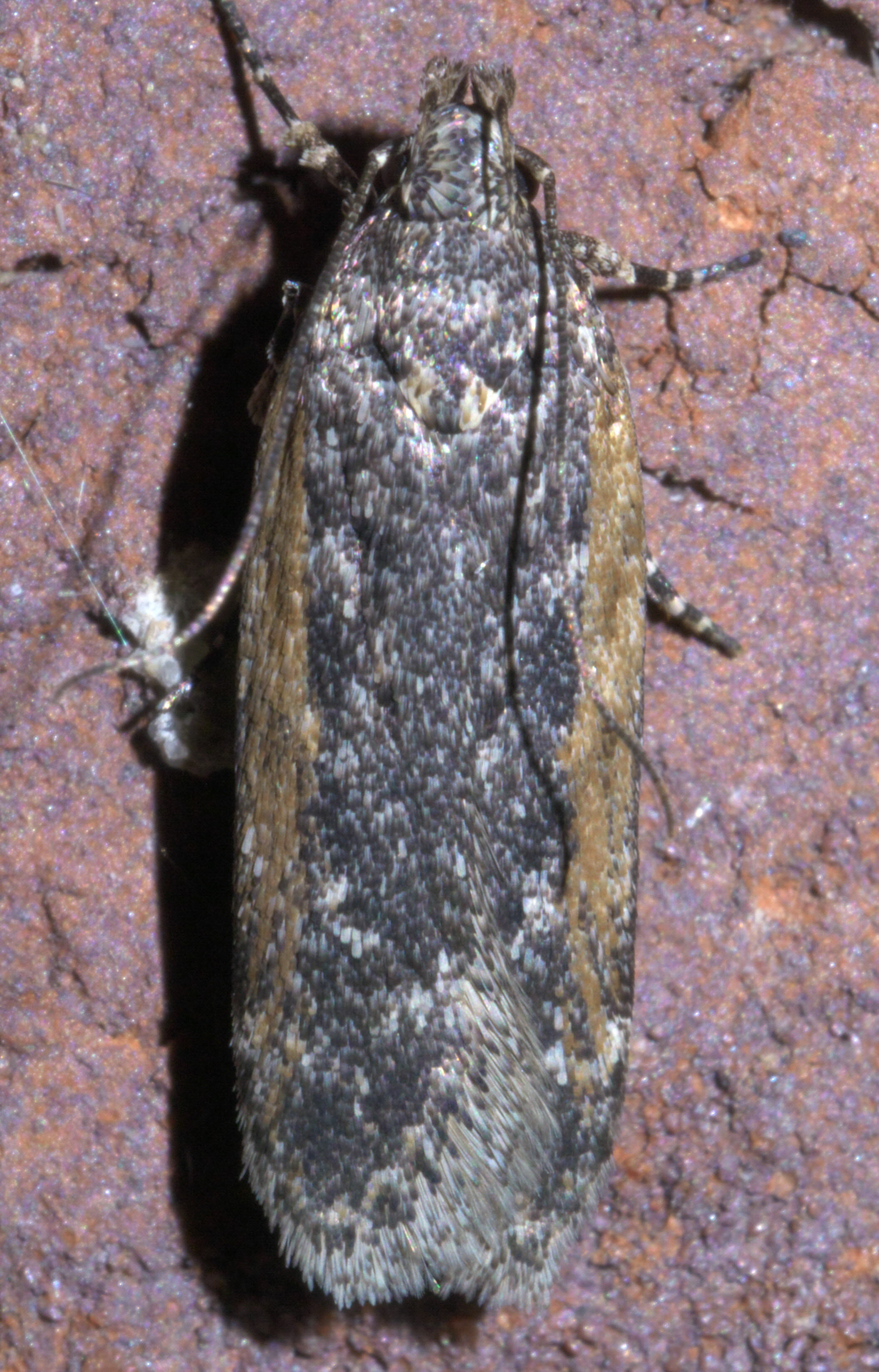 Filatima serotinella, Hodges #2172, Size: 11.2 mm, ID Confidence: 88